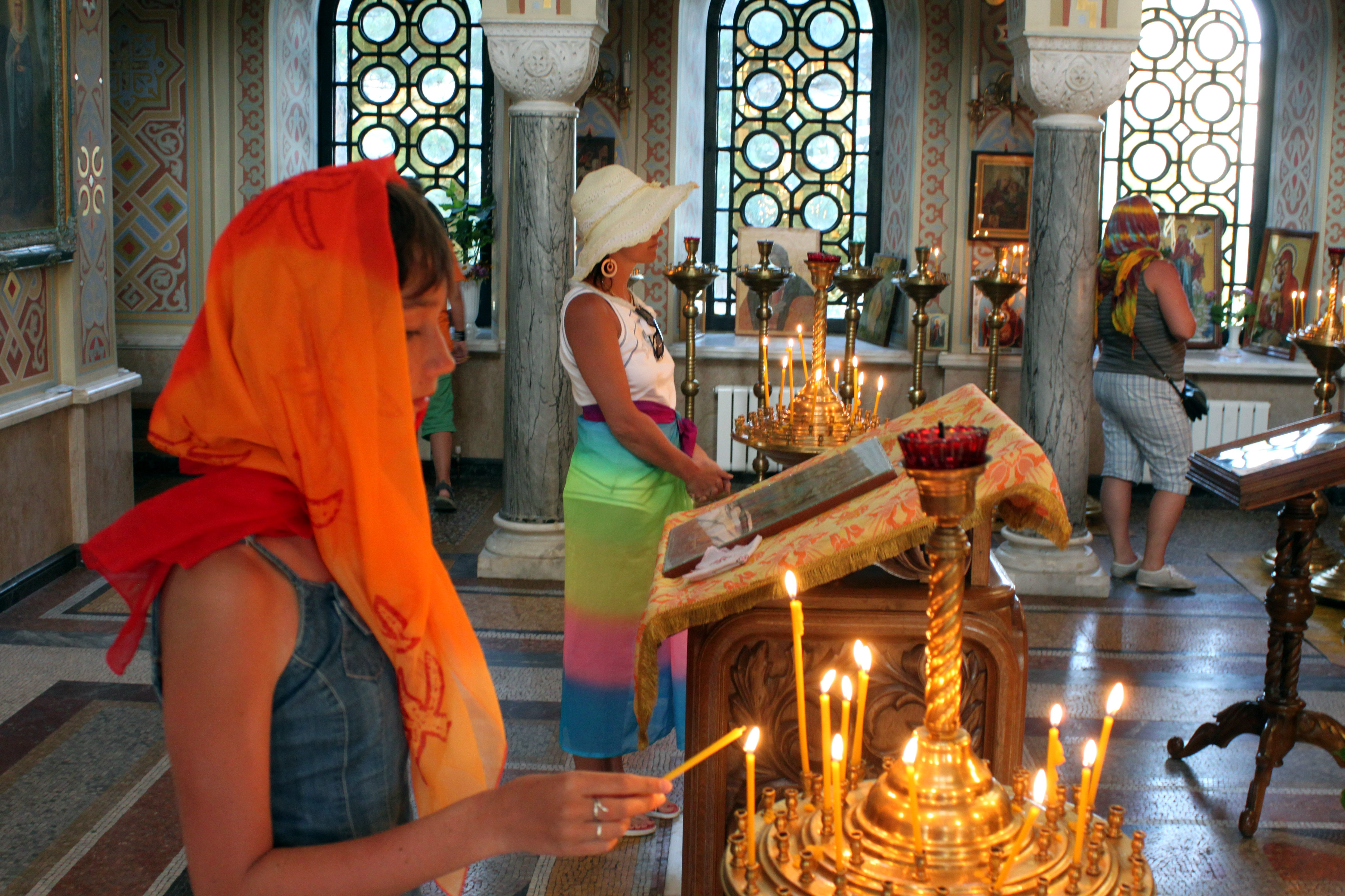 Церква Воскресіння Христового, Форос, с. Форос, поблизу перевалу Байдарські ворота